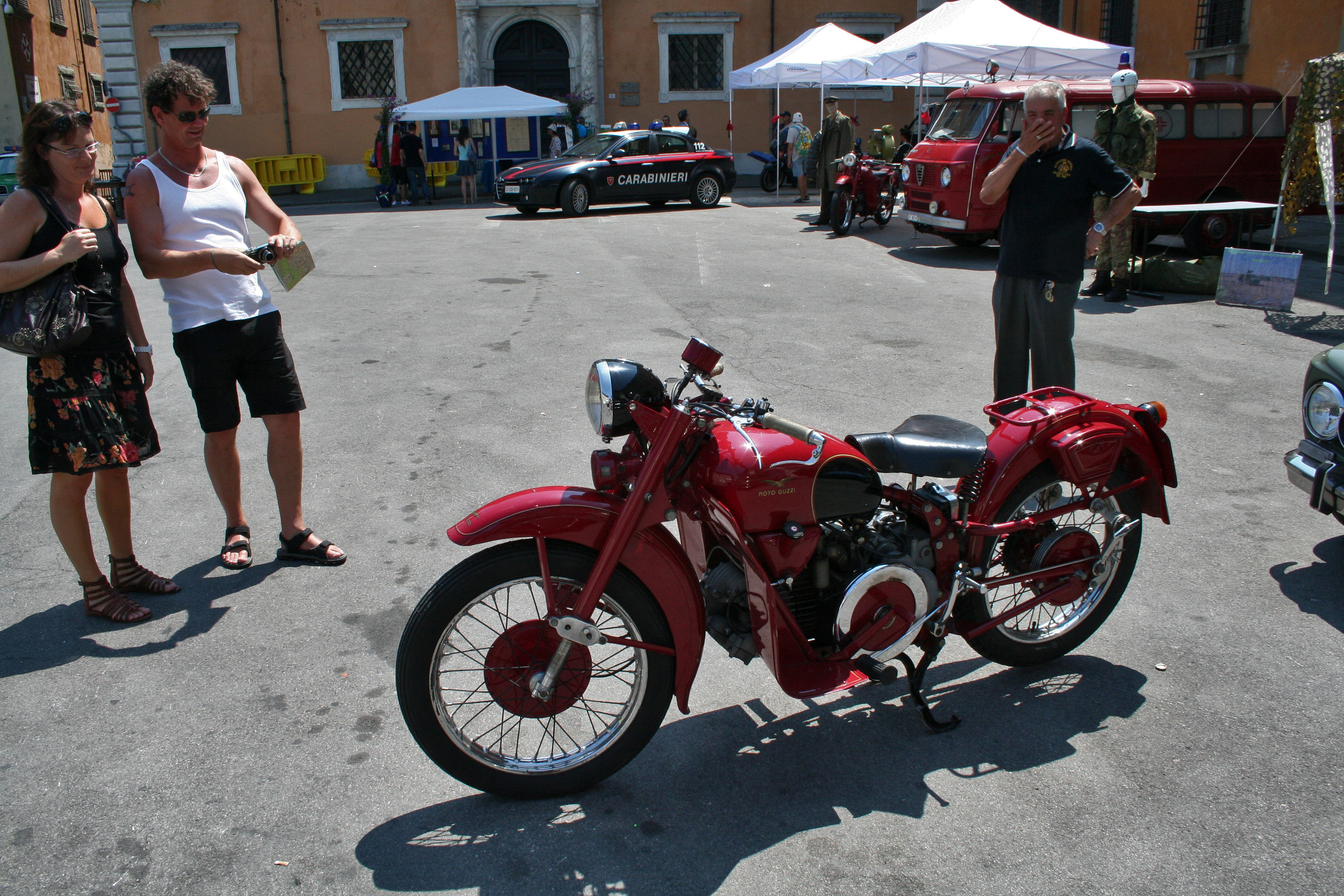 Moto Guzzi Sienassa 2011